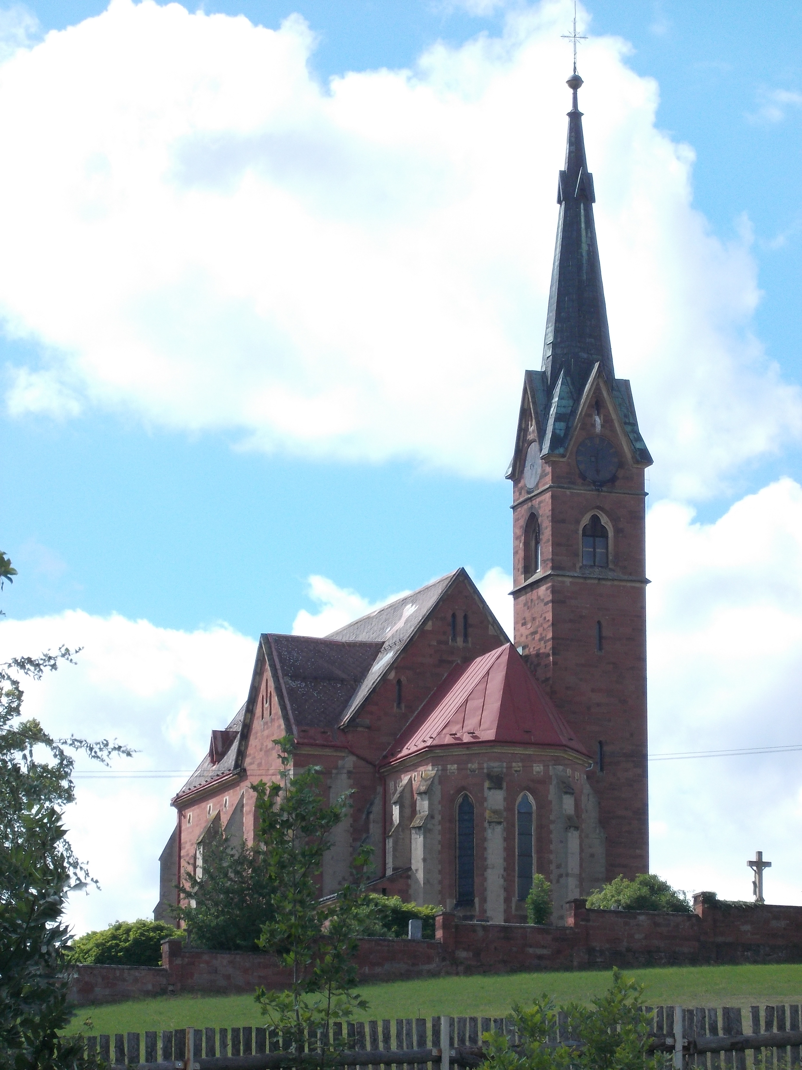 Zálesní Lhota - pohled od jihovýchodu, z dolní části obce